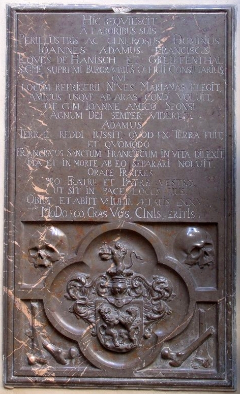 Hanisch von Greifenthal grabstone, Cathedral Our Lady of Snow, Praga